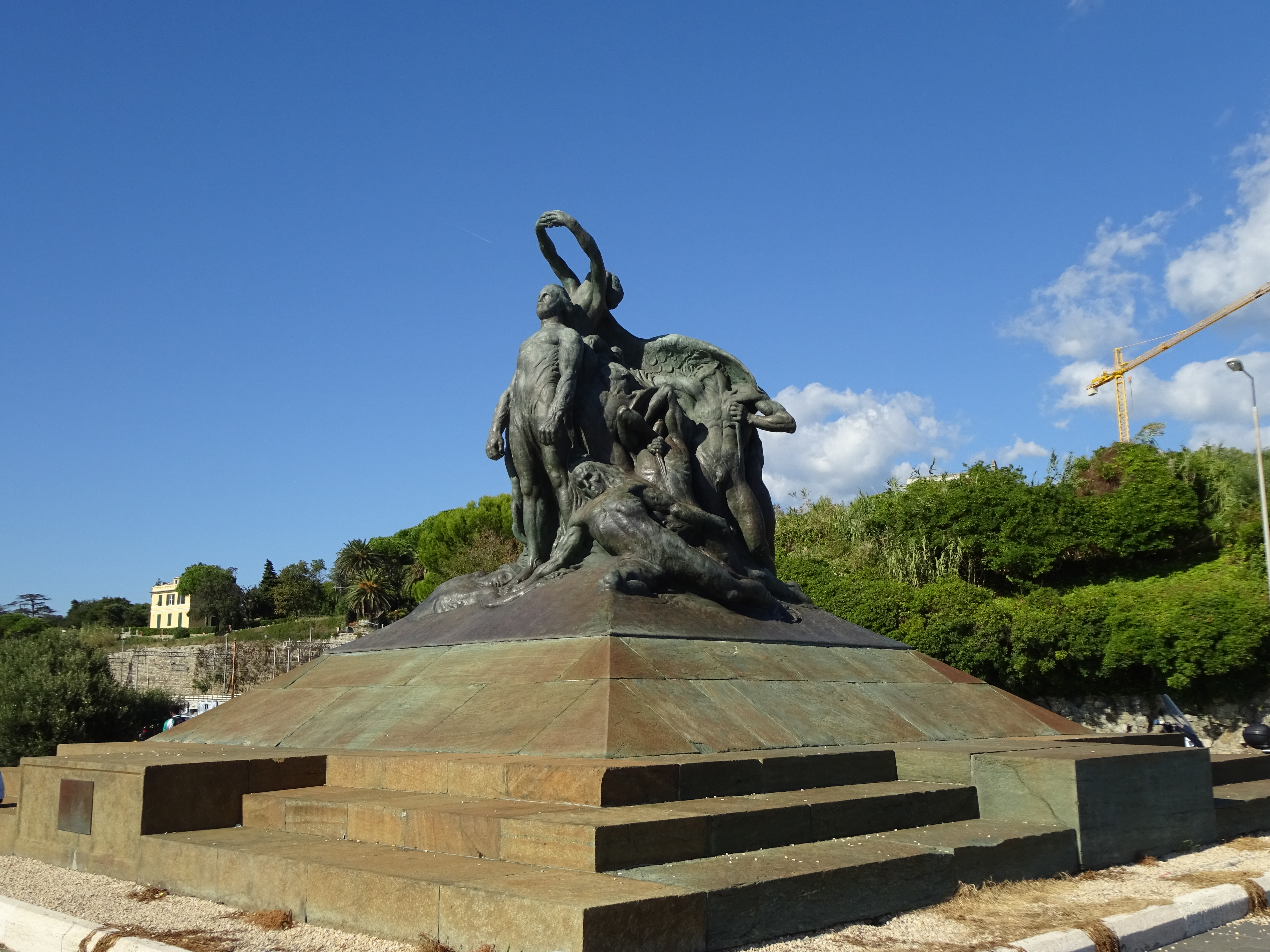 Monumento ai Mille This is a photo of a monument which is part of cultural heritage of Italy.